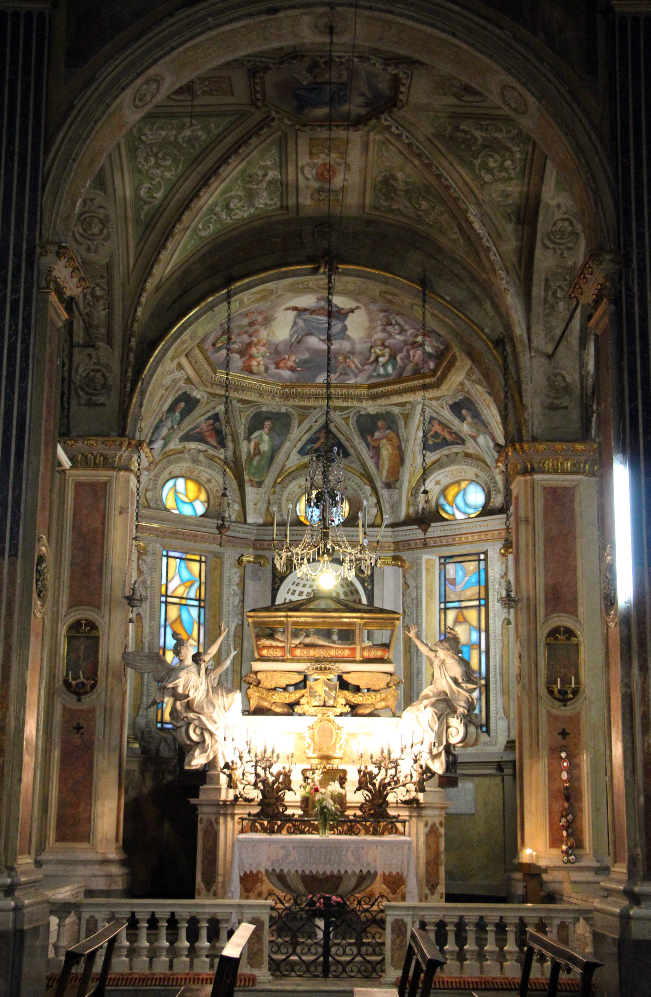 Santissima Annunziata di Portoria